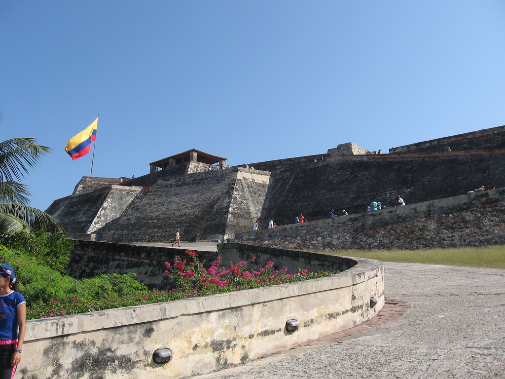 Castillo San Felipe de Barajas Cartagena, Colombia gennaio 2007